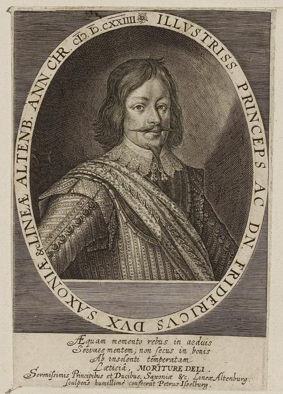 Grafik aus dem Klebeband Nr. 1 der Fürstlich Waldeckschen Hofbibliothek Arolsen Motiv: Herzog Friedrich von Sachsen-Altenburg (1599–1625)